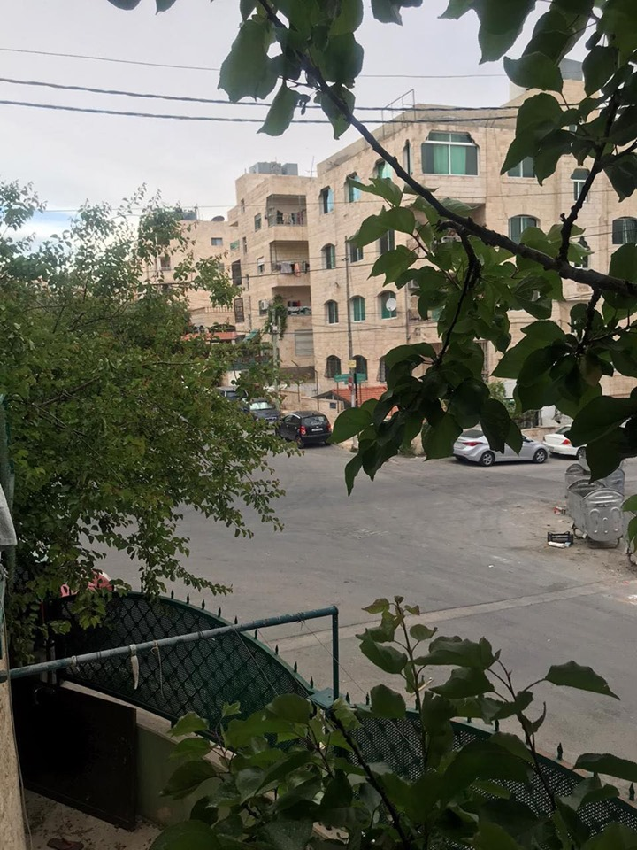 صورة ملتقطة من أحد شوارع ضاحية الأمير حسن القريبة من شارع الإستقلال في العاصمة عمان